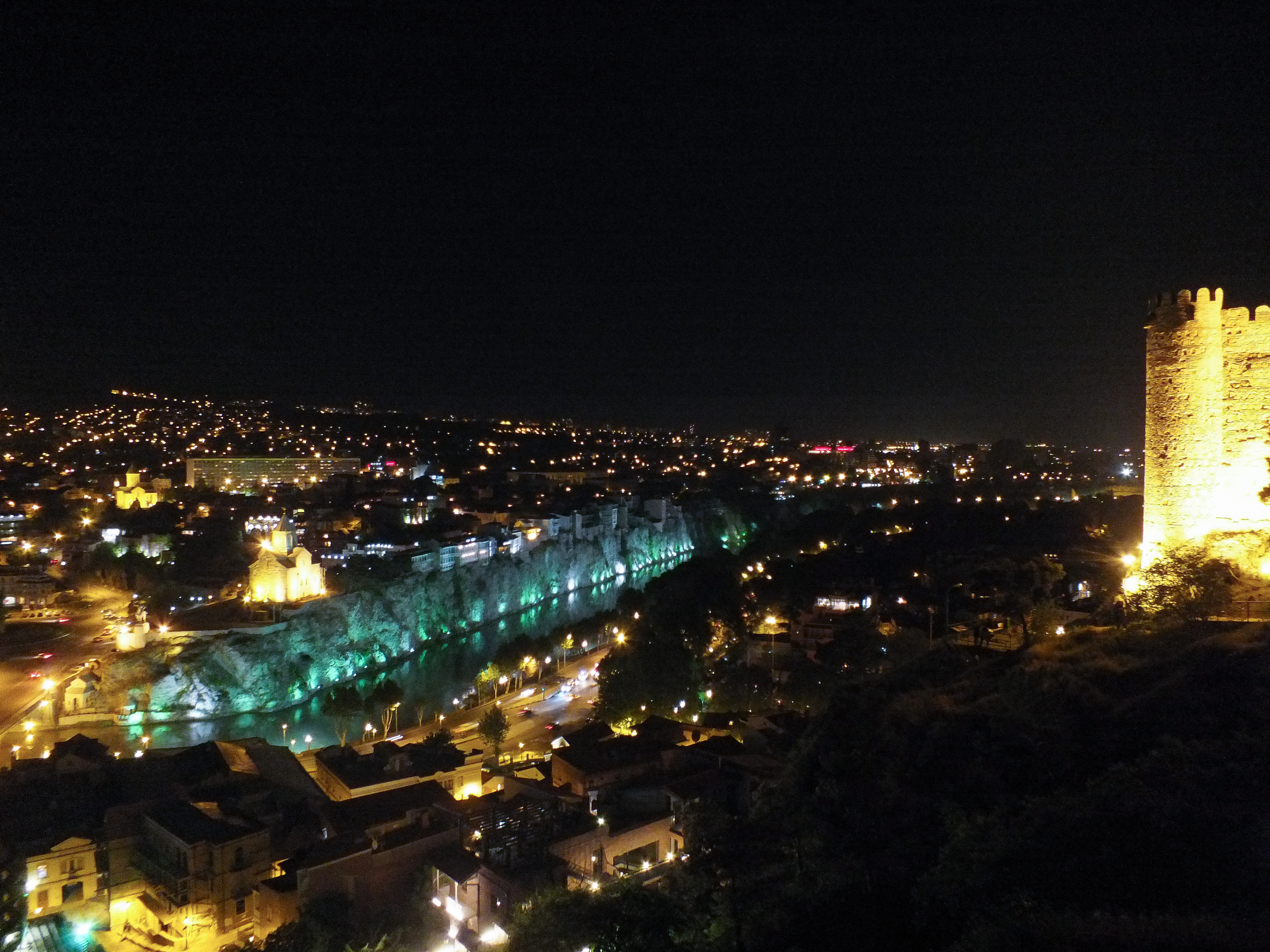 View from Narikala, Tbilisi at night